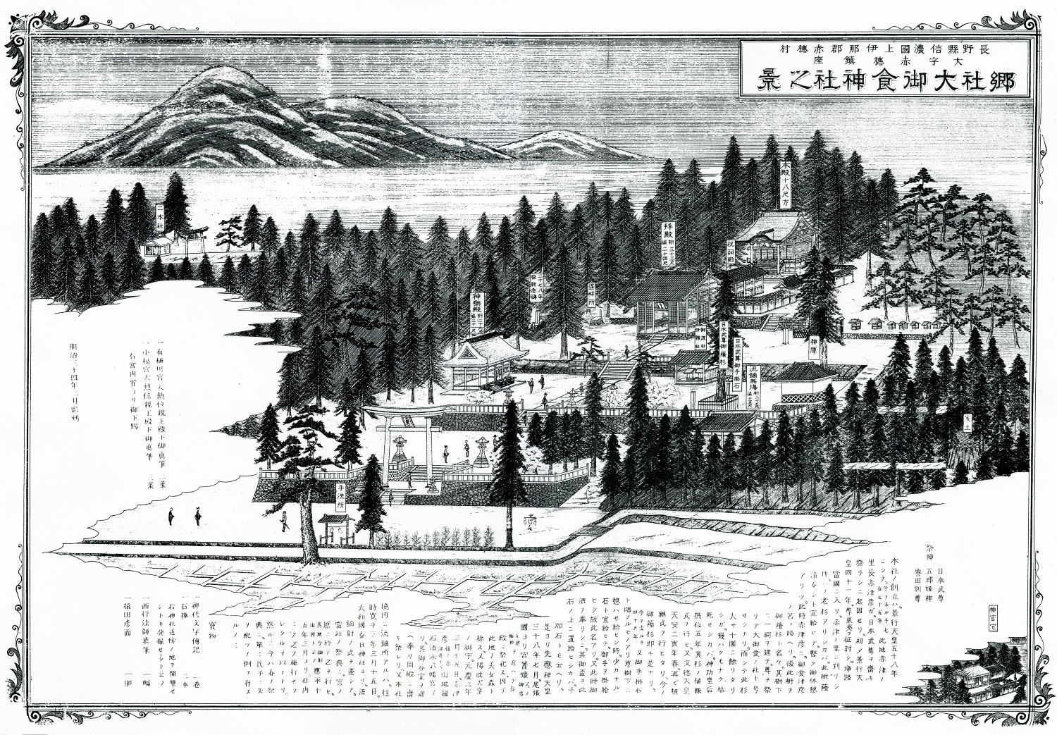 大御食神社の全景（明治34年）